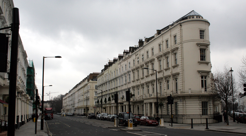 Belgrave Road, London.